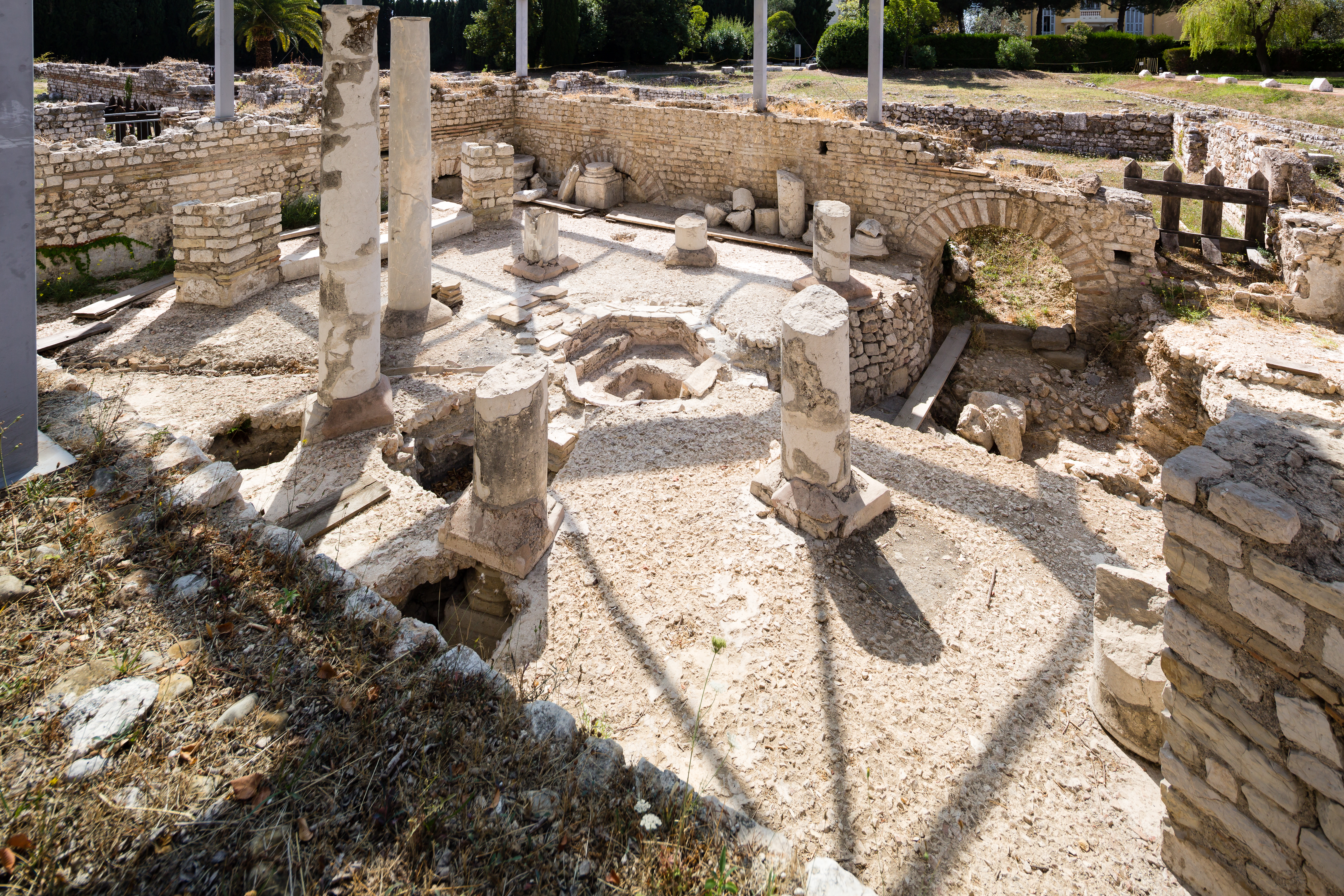 Les thermes romains de Cimiez à Nice (France).